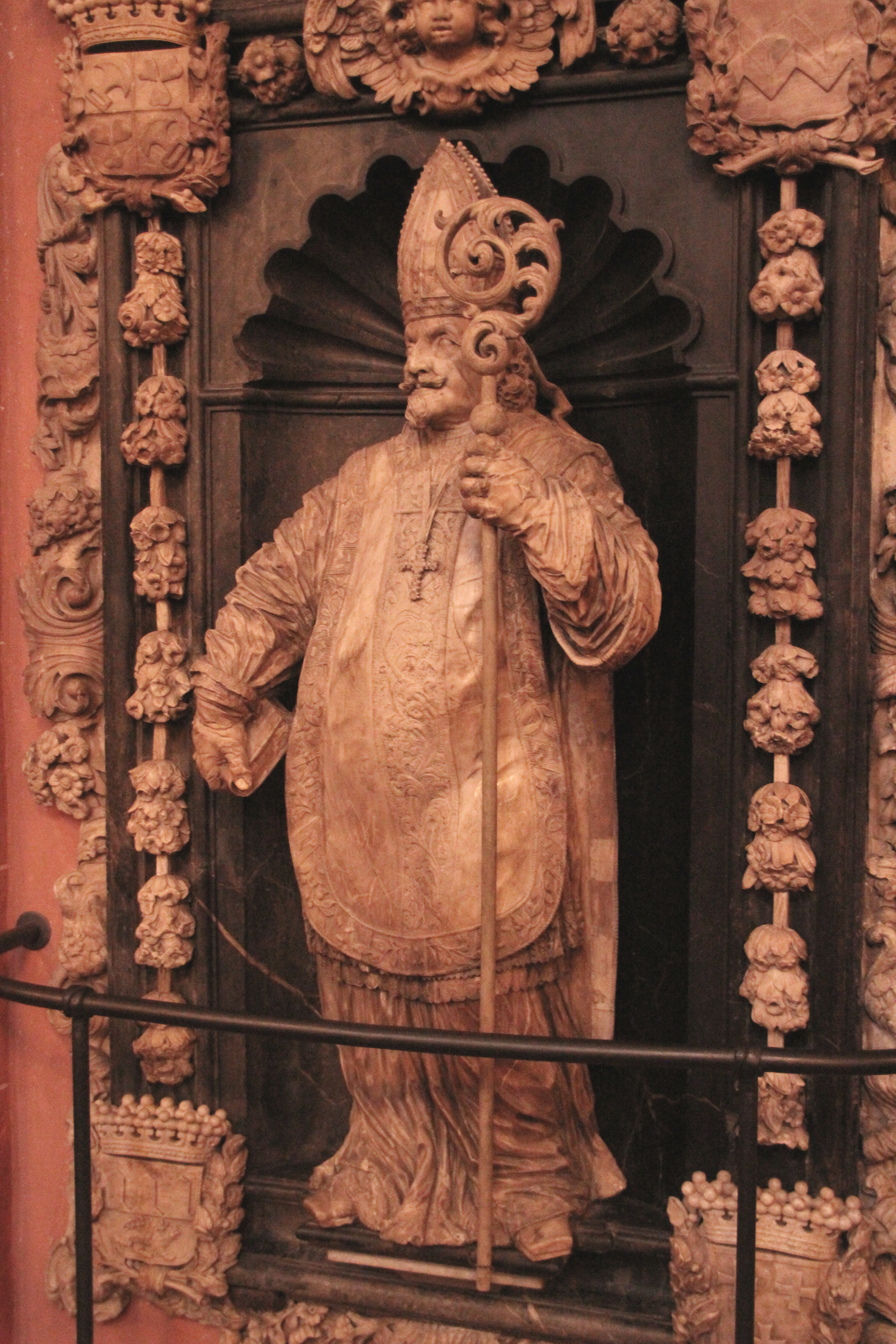 Bildinhalt: Grabmal des Wormser Bischofs Johann Karl von und zu Franckenstein (1610-1691), im Frankfurter Kaiserdom Aufnahmeort: Frankfurt am Main, Deutschland